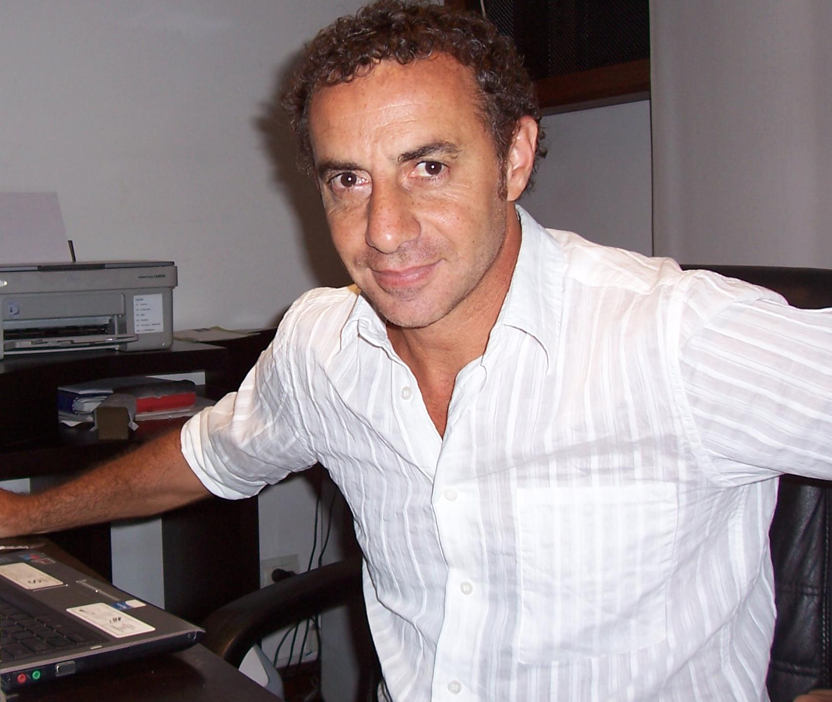 El periodista y escritor argentino Luis Majul.